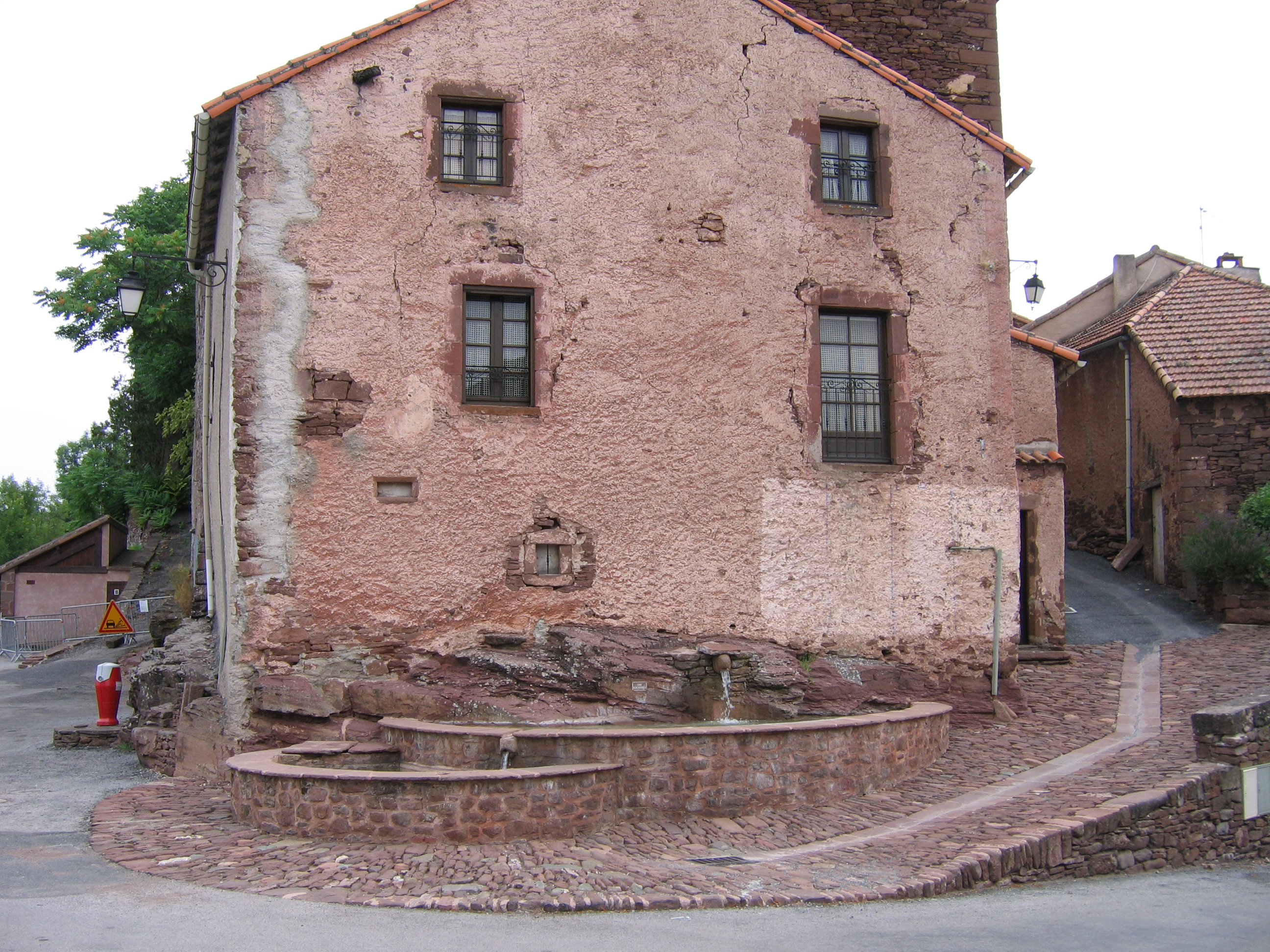 Fontaine de Combret